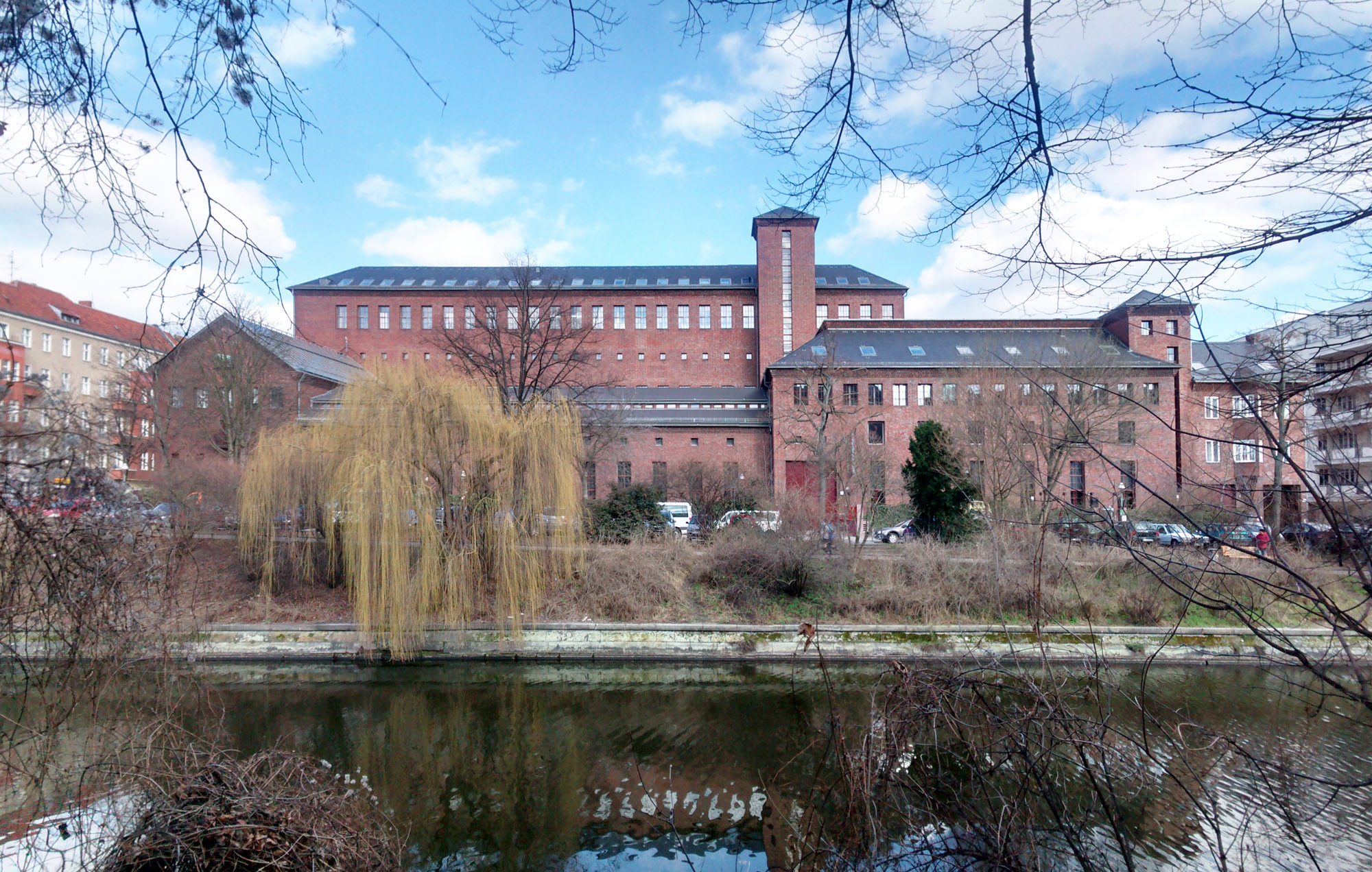 Umspannwerk in Berlin-Kreuzberg, Hans Heinrich Müller, Februar 2014